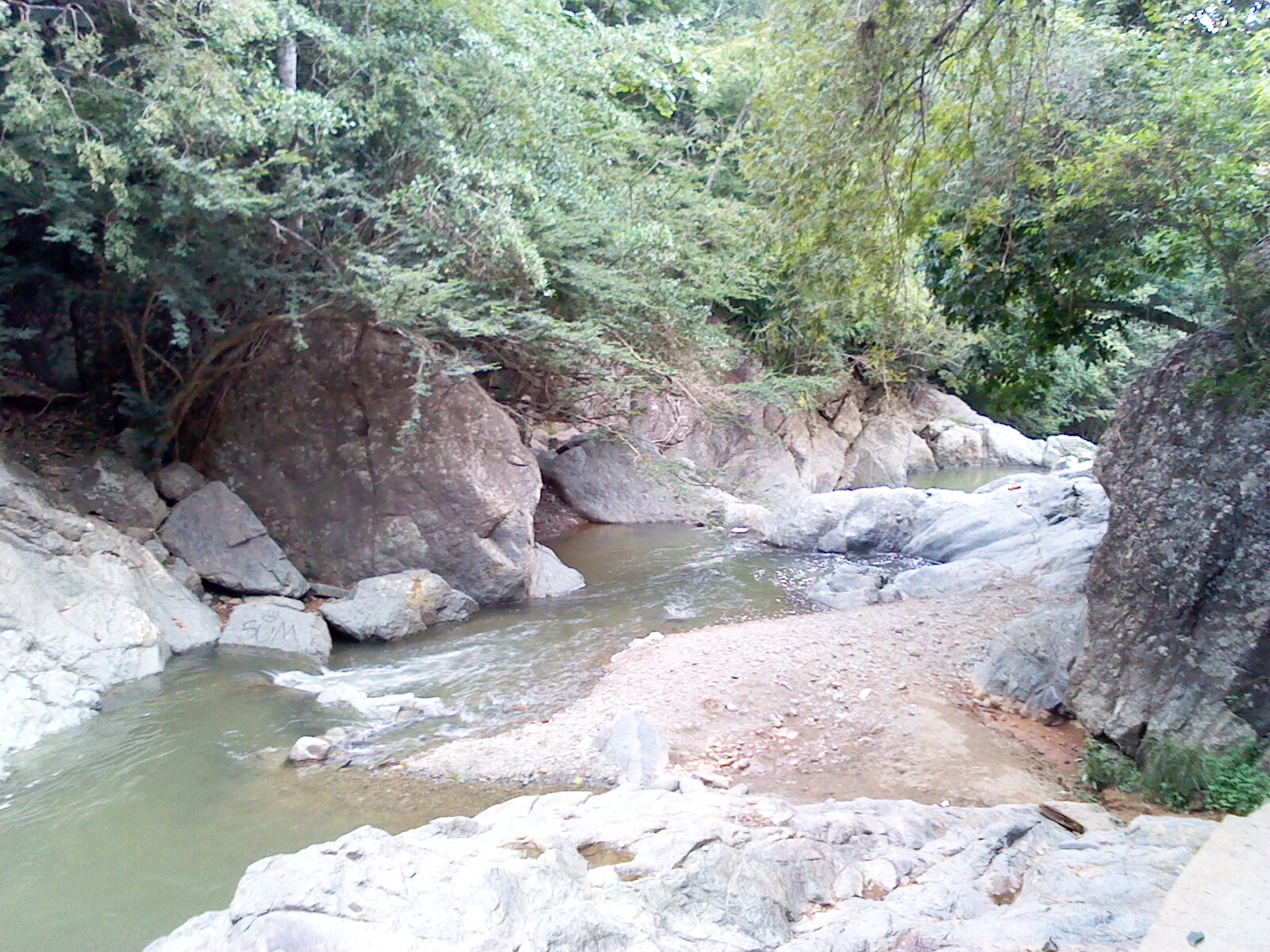 San juan de los Morros